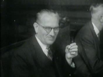 Joris in 't Veld in 1948